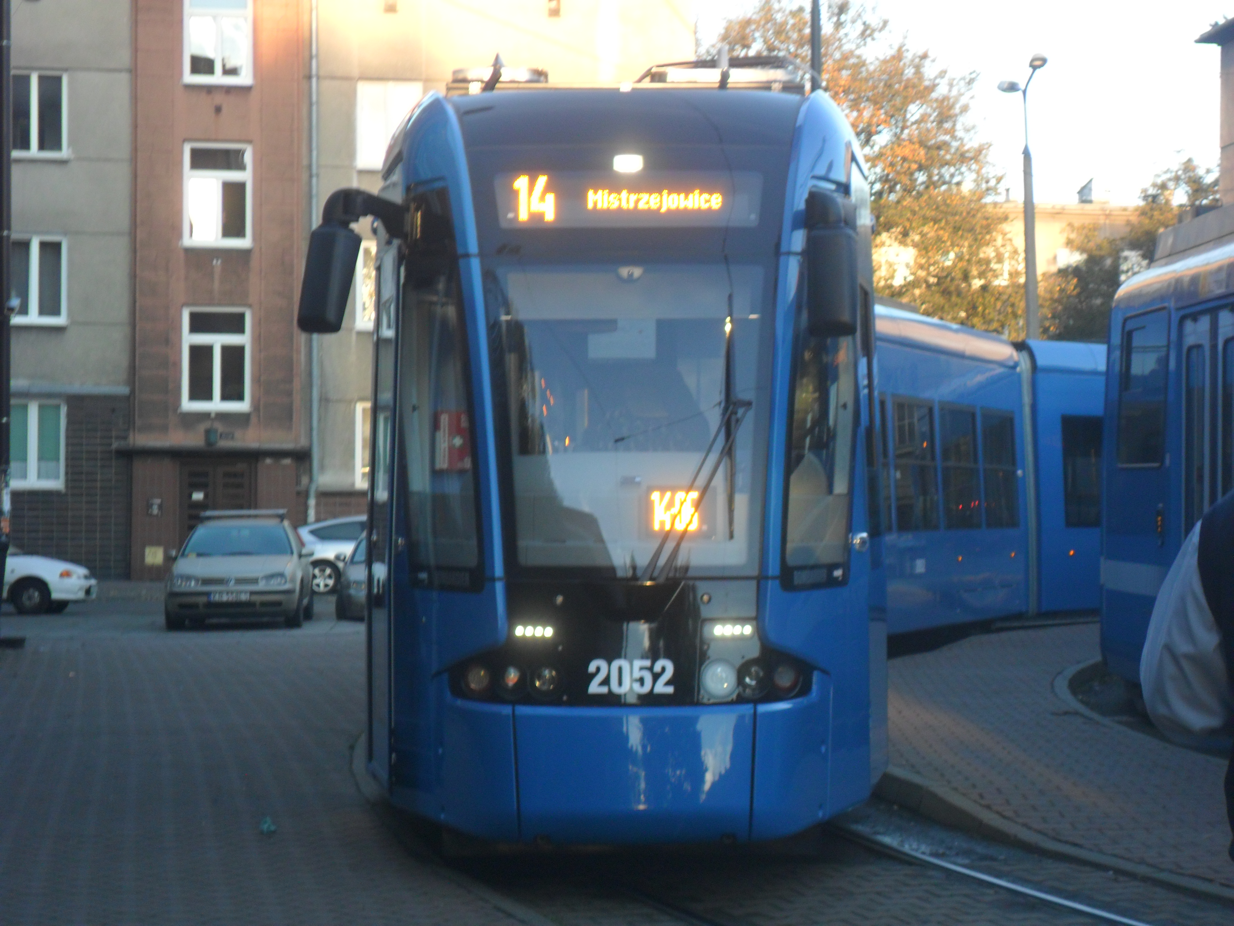 Bombardier NGT8 na pętli w Bronowicach